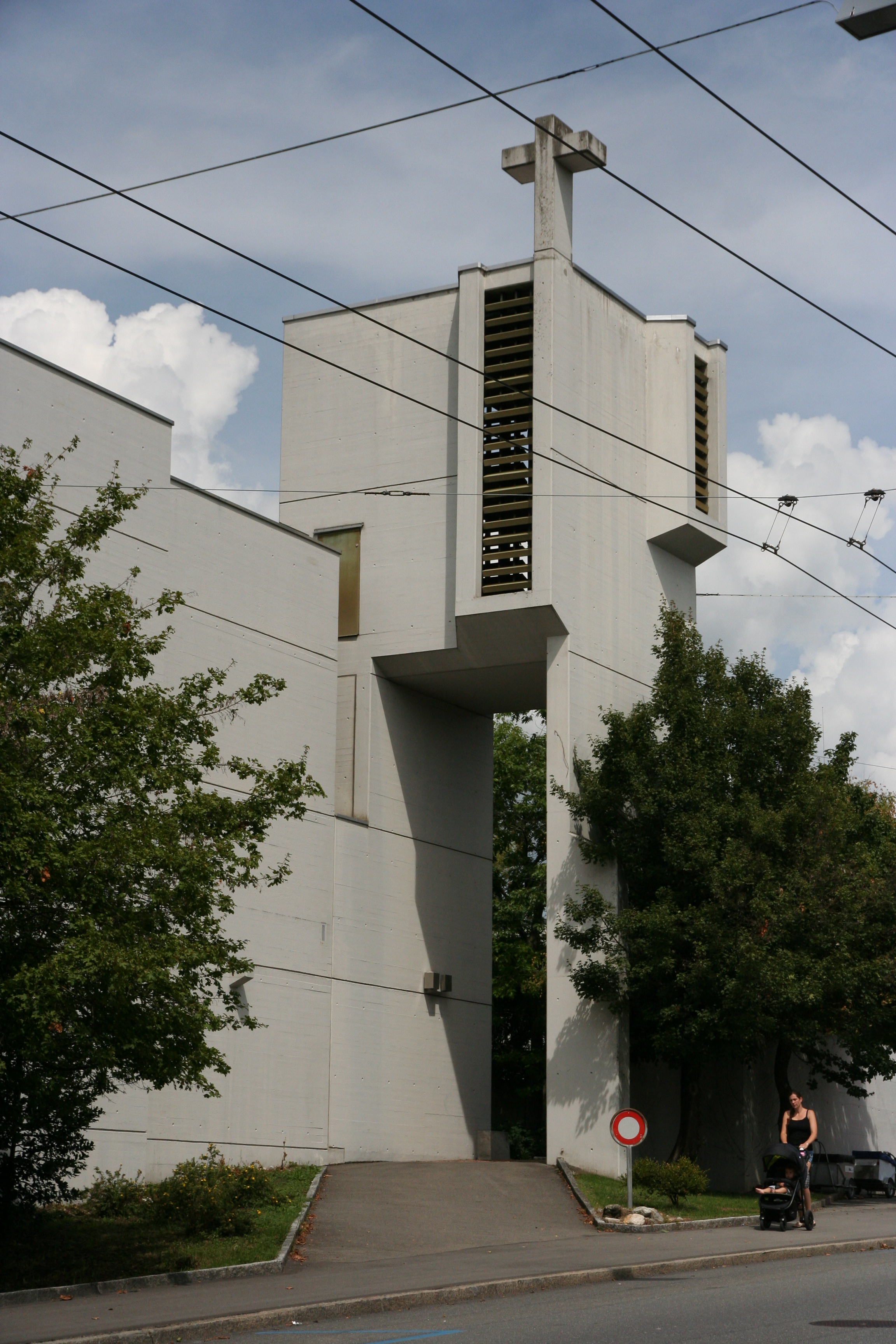 Römisch-katholische Pfarrkirche Christ König Biel/Bienne